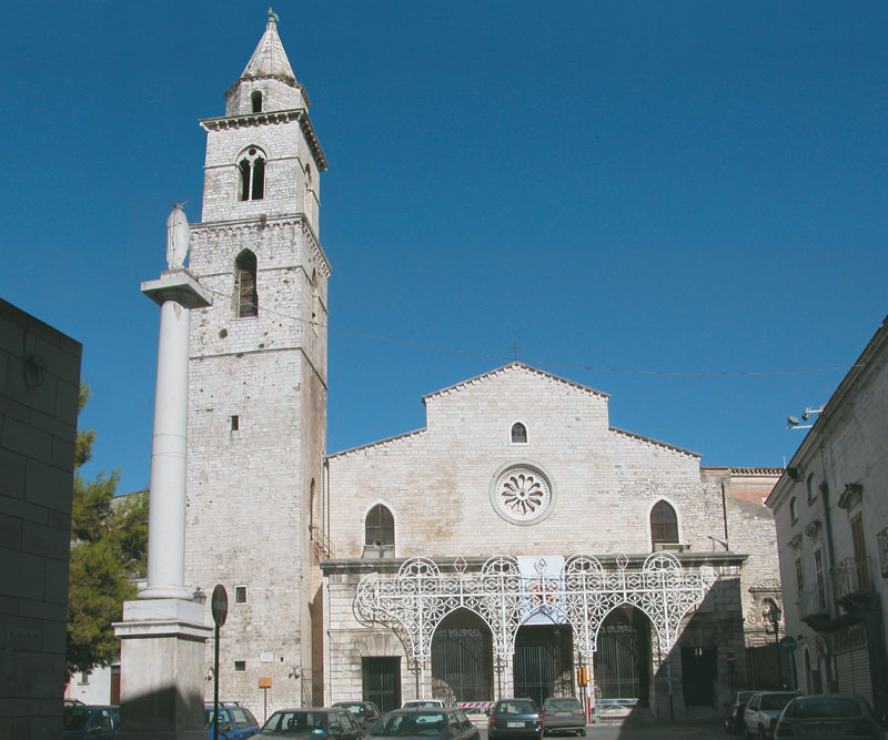 Cattedrale di Andria, Nella cripta le bare delle 2 mogli di Federico II di Svevia